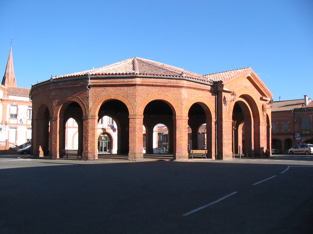 Halle de la commune de Saint-Lys